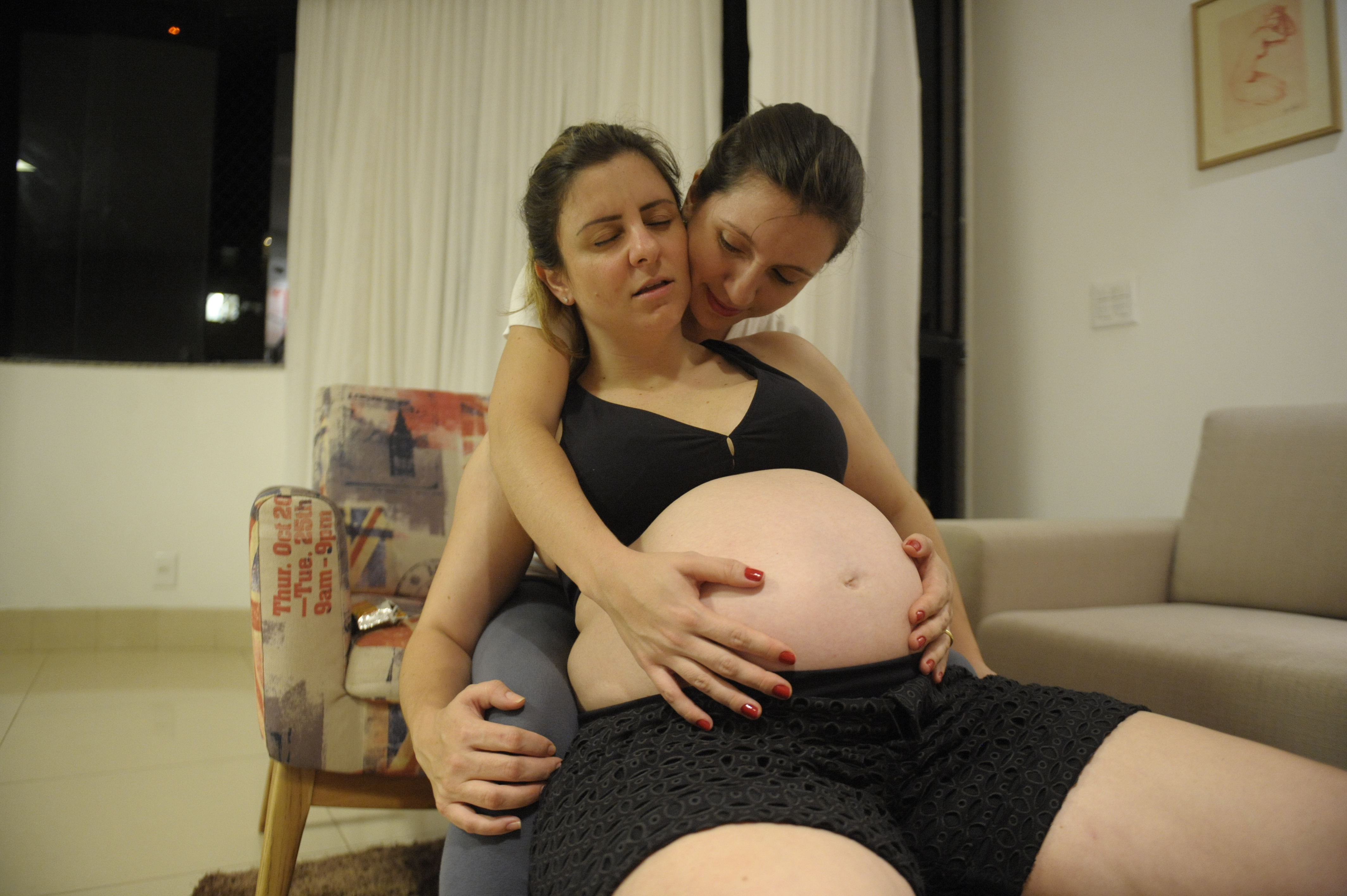 Doulas oferecem orientação, suporte físico e emocional à família na gravidez e no parto. A doula Jéssica Macêdo orienta Luciana Rodovalho sobre posições, exercícios e cuidados que ajudam a gestante a se sentir mais confortável no final da gravidez e aliviam as dores no trabalho de parto, como banho, posição de "cavalinho" e apoio de bola. Foto: Jefferson Rudy/Agência Senado